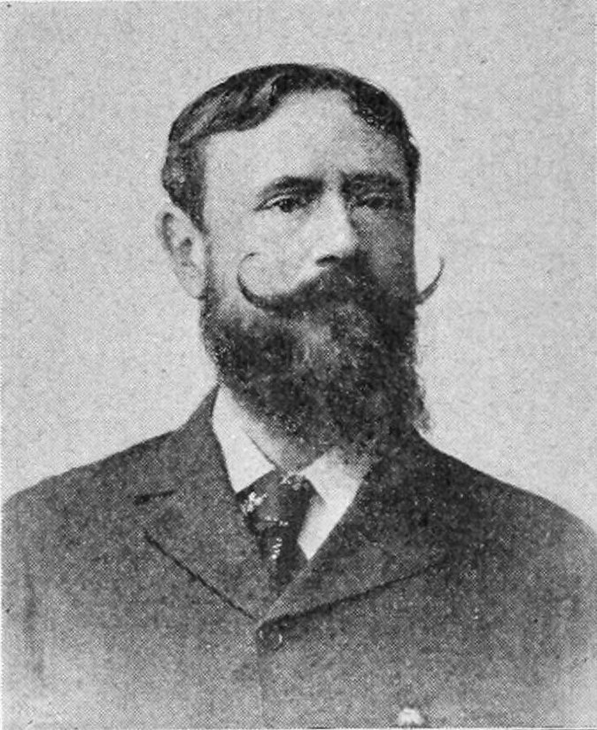 Joseph-Félix Bouchor, peintre français